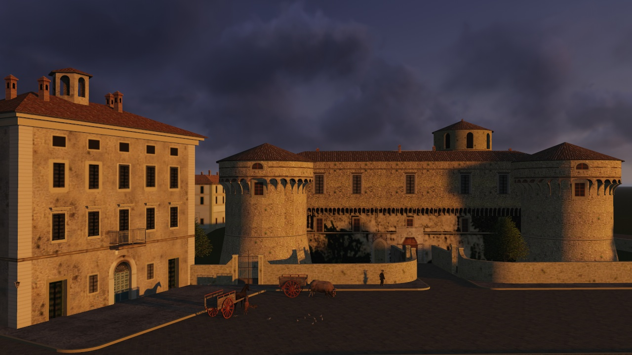 ricostruzione 3D di piazza del Castello prima del terremoto